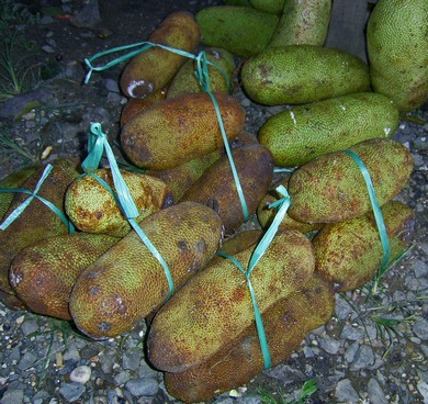 Artocarpus integer, fruit, sold at roadside, Muara Lawa, Kutai Barat, East Kalimantan, Indonesia